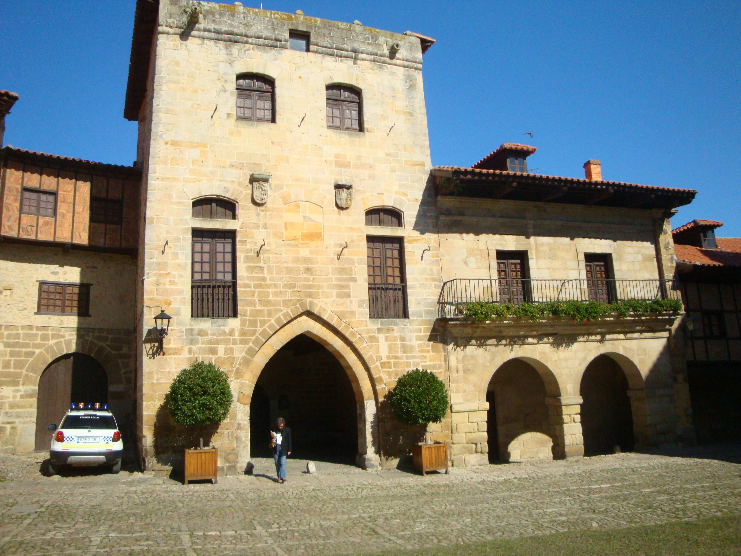 Ciudad Monumental de Santilla del Mar (Cantabria) (España)